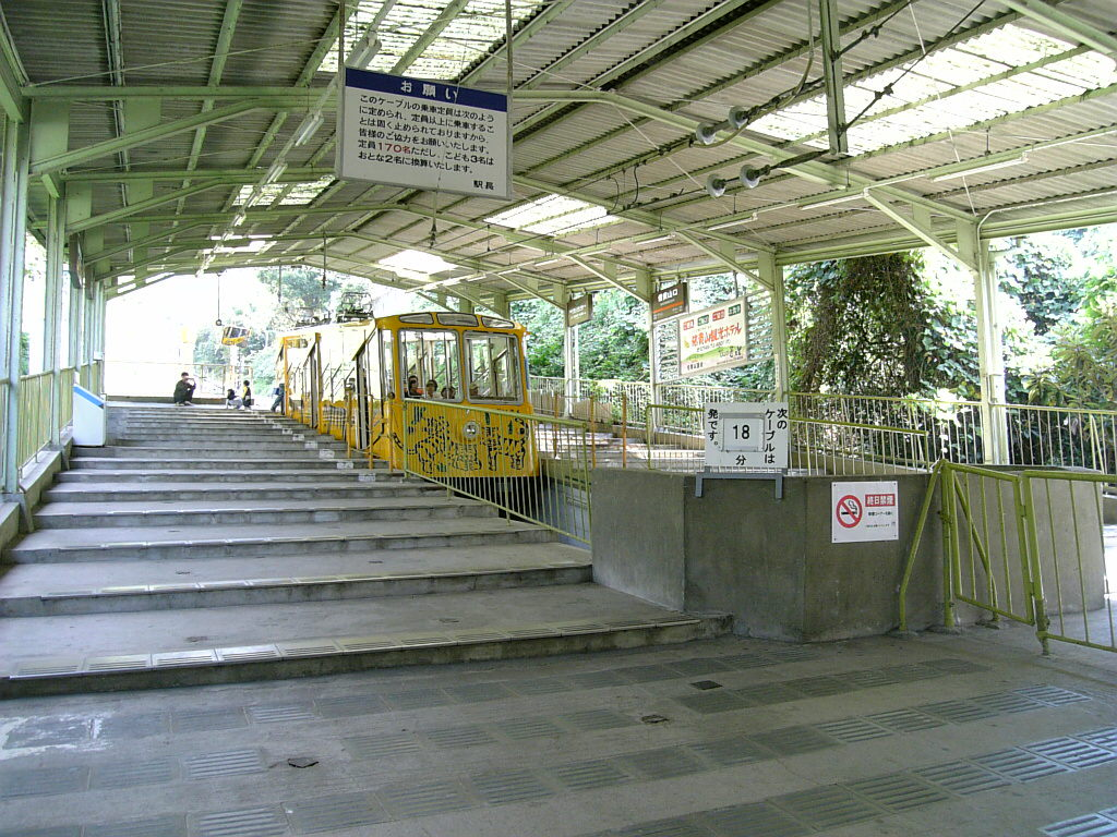 近鉄信貴山口駅ケーブルカー乗場